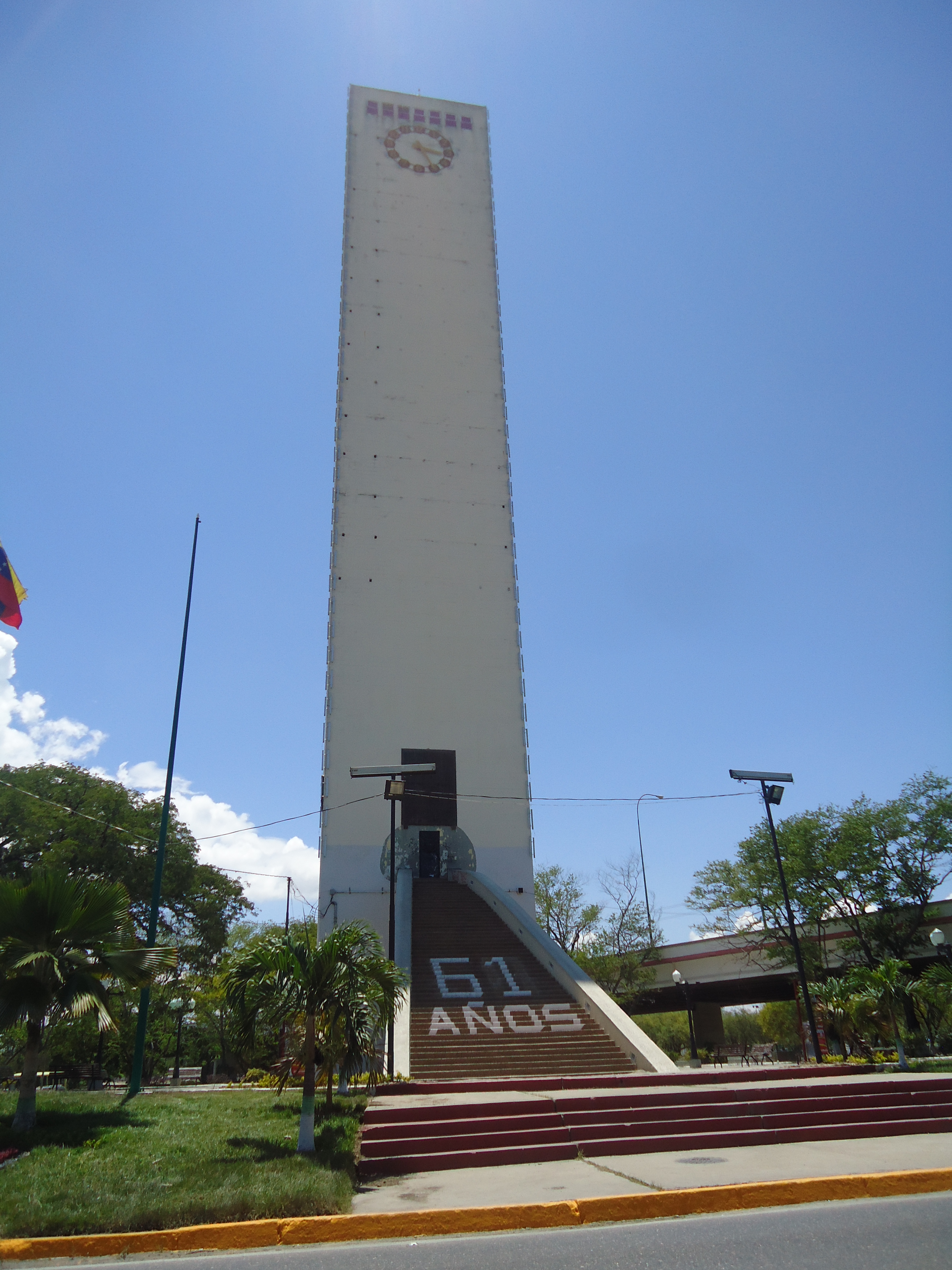 OBELISCO DE BARQUISIMETO ESTADO LARA